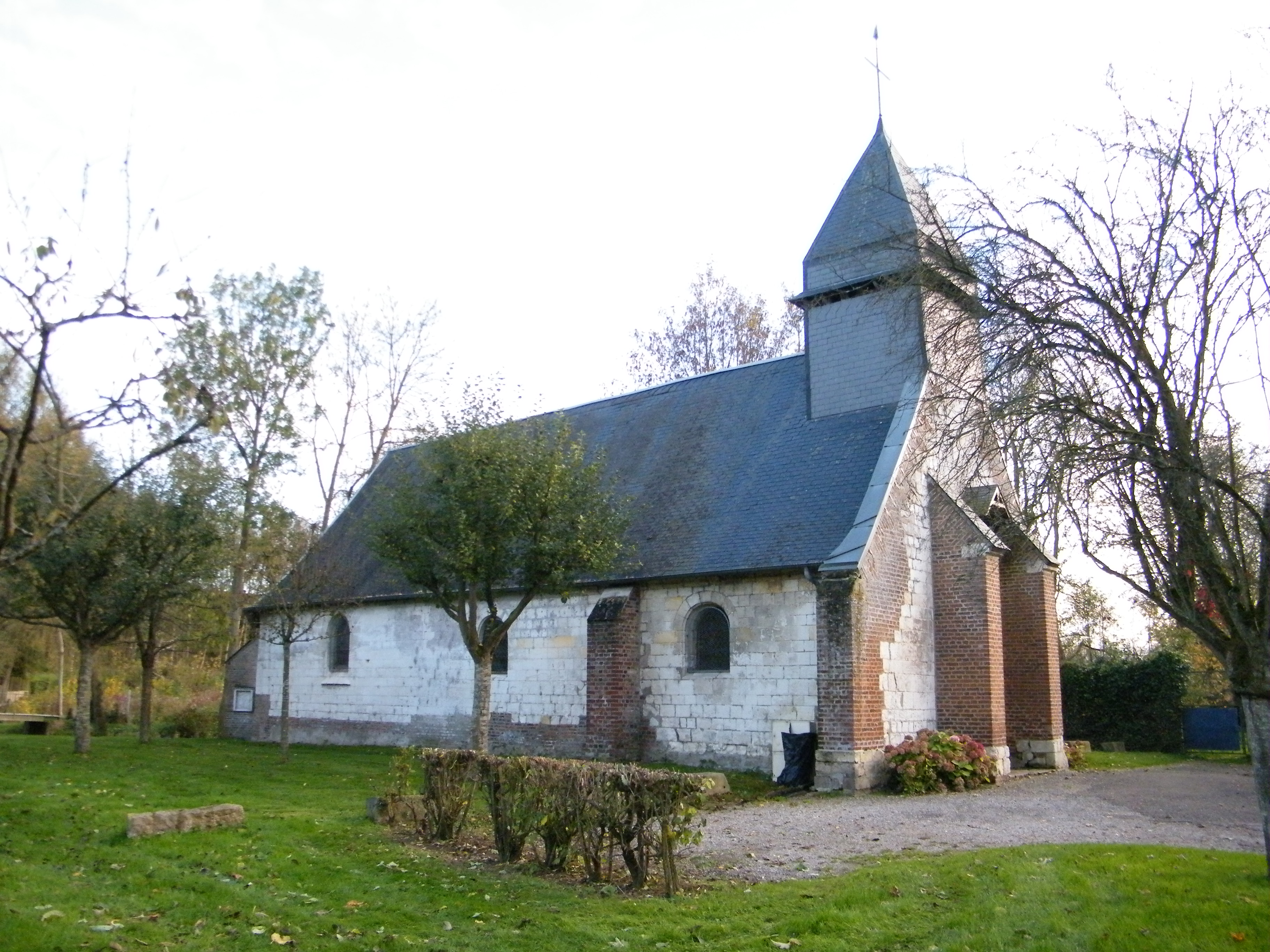 L'église.